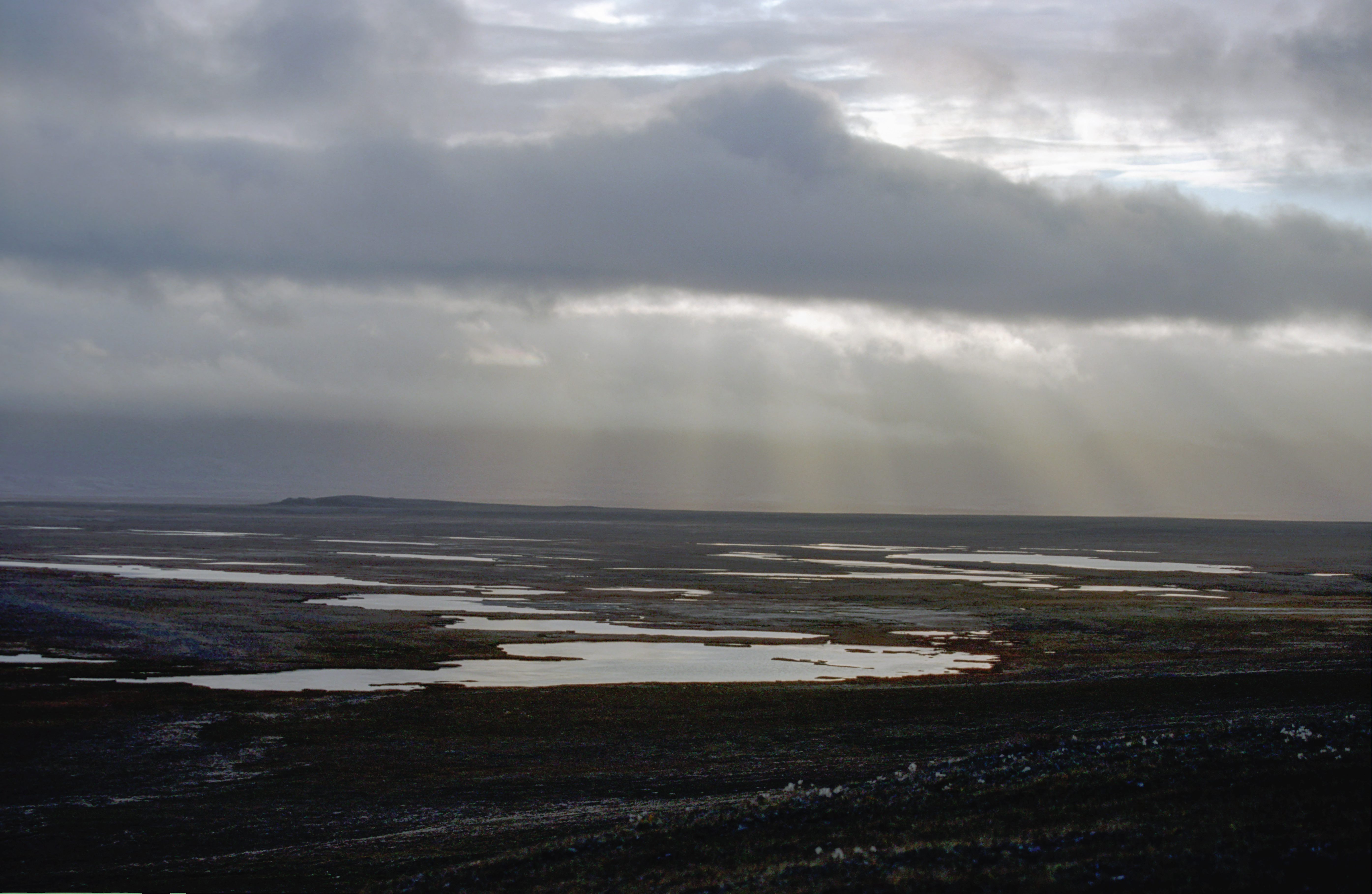 Myggbukta (Zatoka Moskitów)